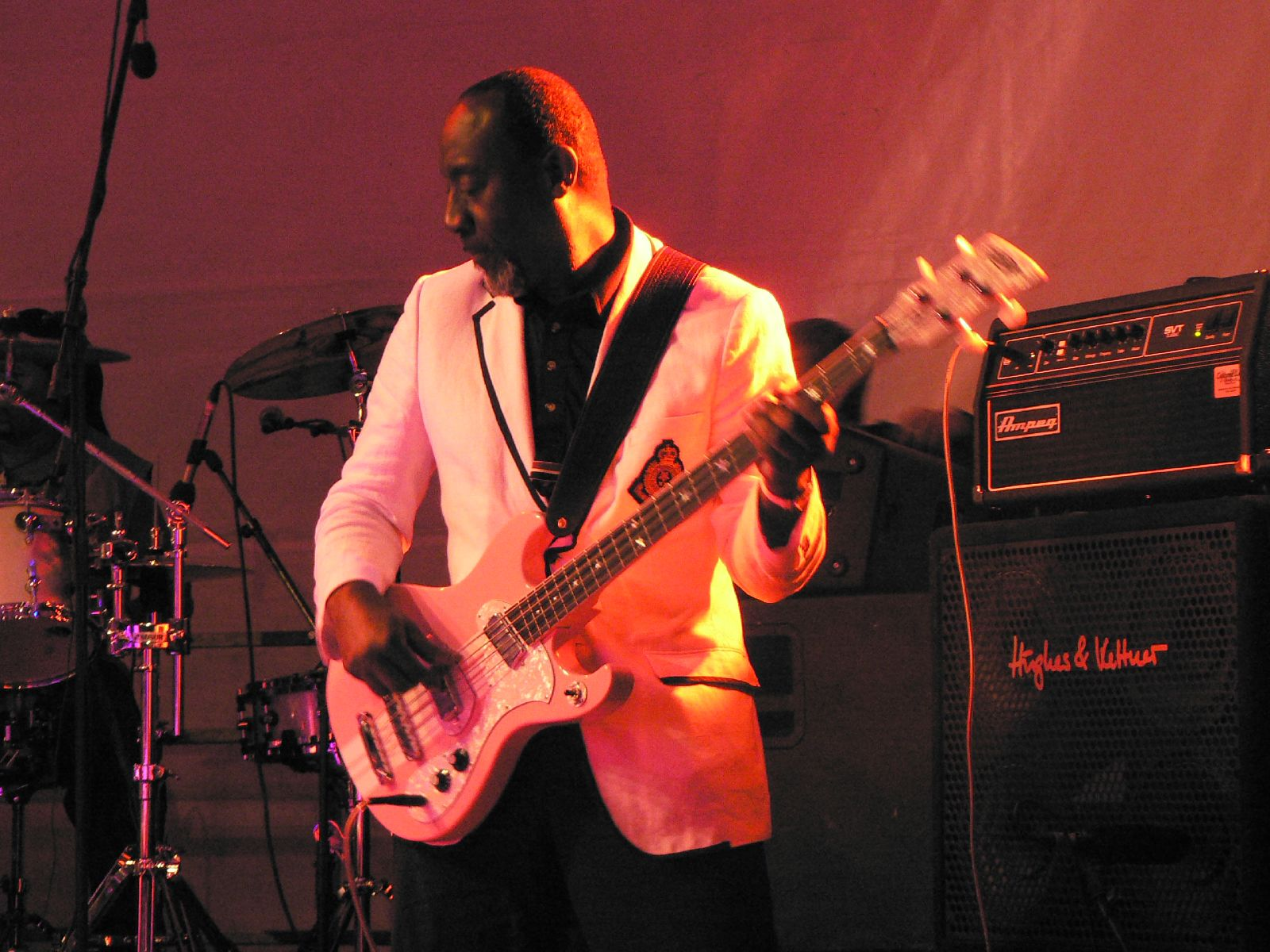 Jamaaladeen Tacuma DiPinto Mach IV Bass